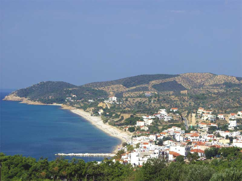 Limenaria aus Ost